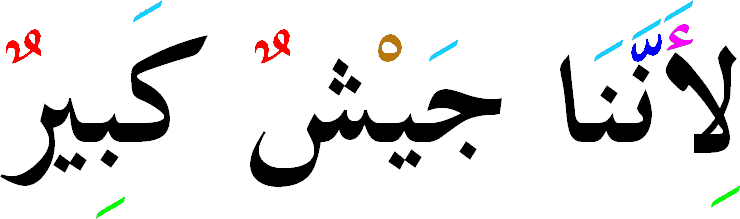 Beispieltext mit Verwendung von Taschkil: hellblau - Fatha, hellgrün - Kasra rot - Dammatān, braun - Sukun blau - Taschdid, violett - Hamza.